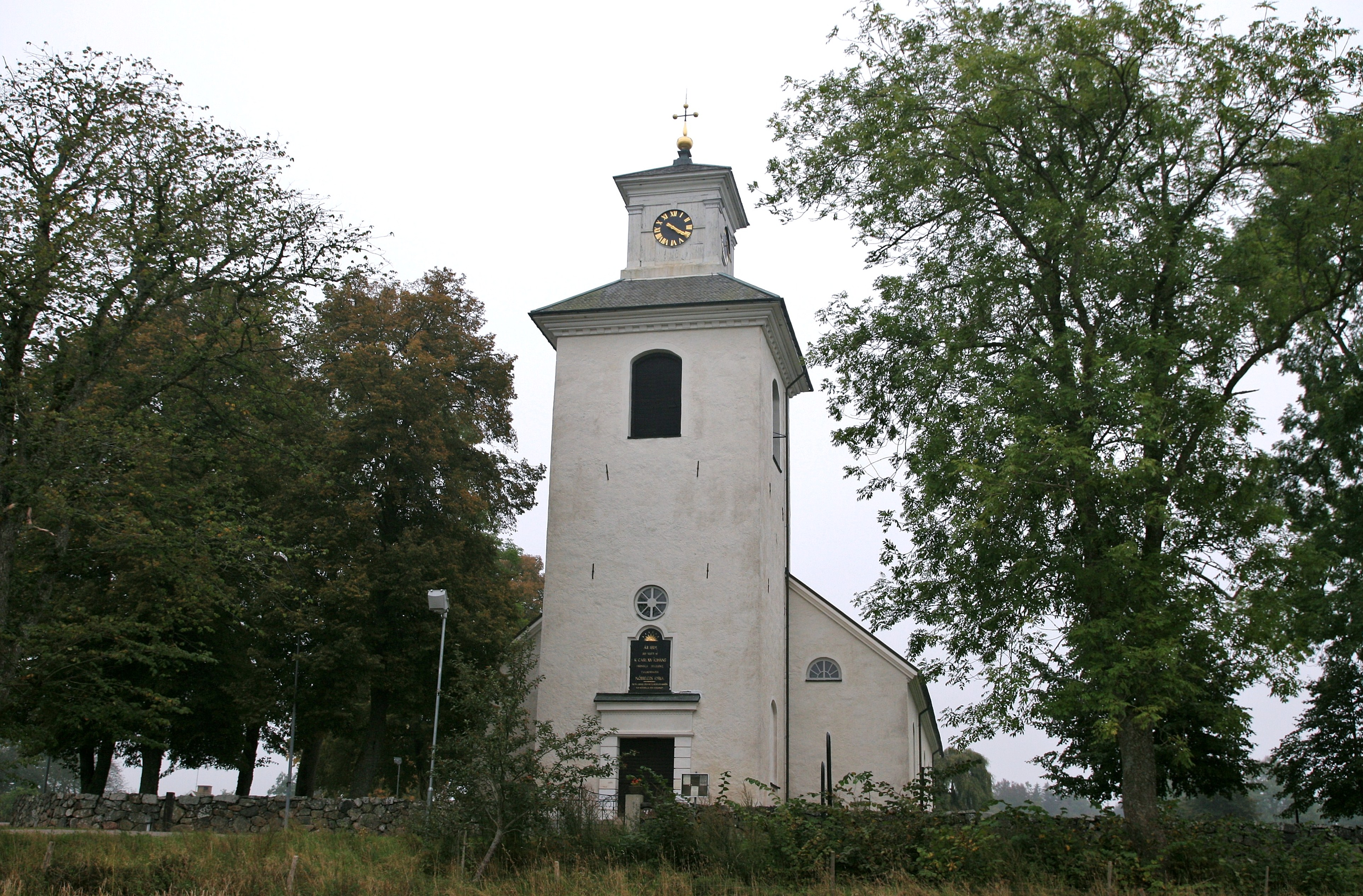 Nöbbele kyrka (Värends-Nöbbele 1:17)